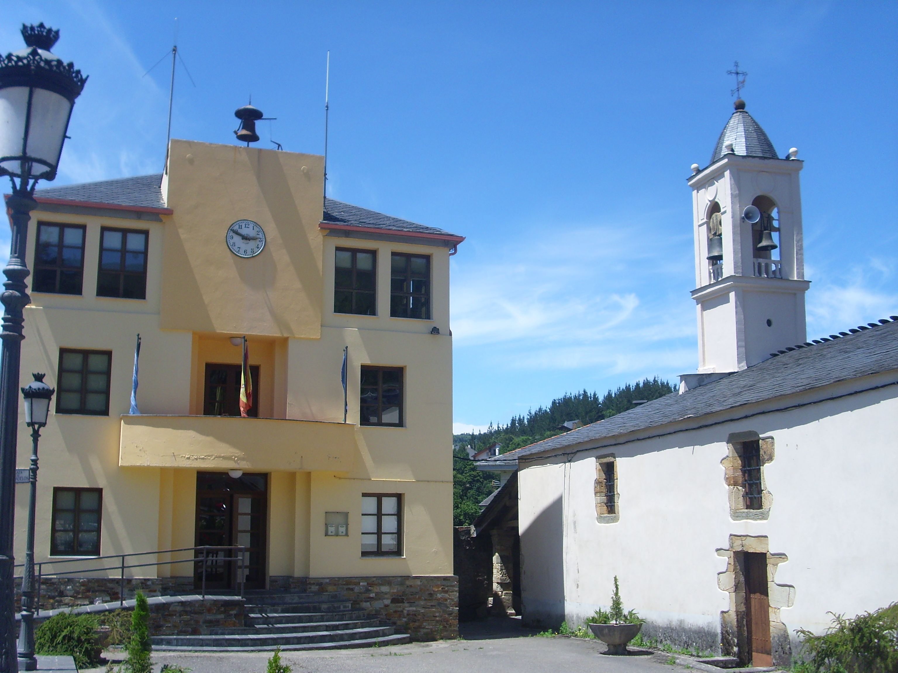 Ayuntamiento de Santa Eulalia de Oscos, Asturias